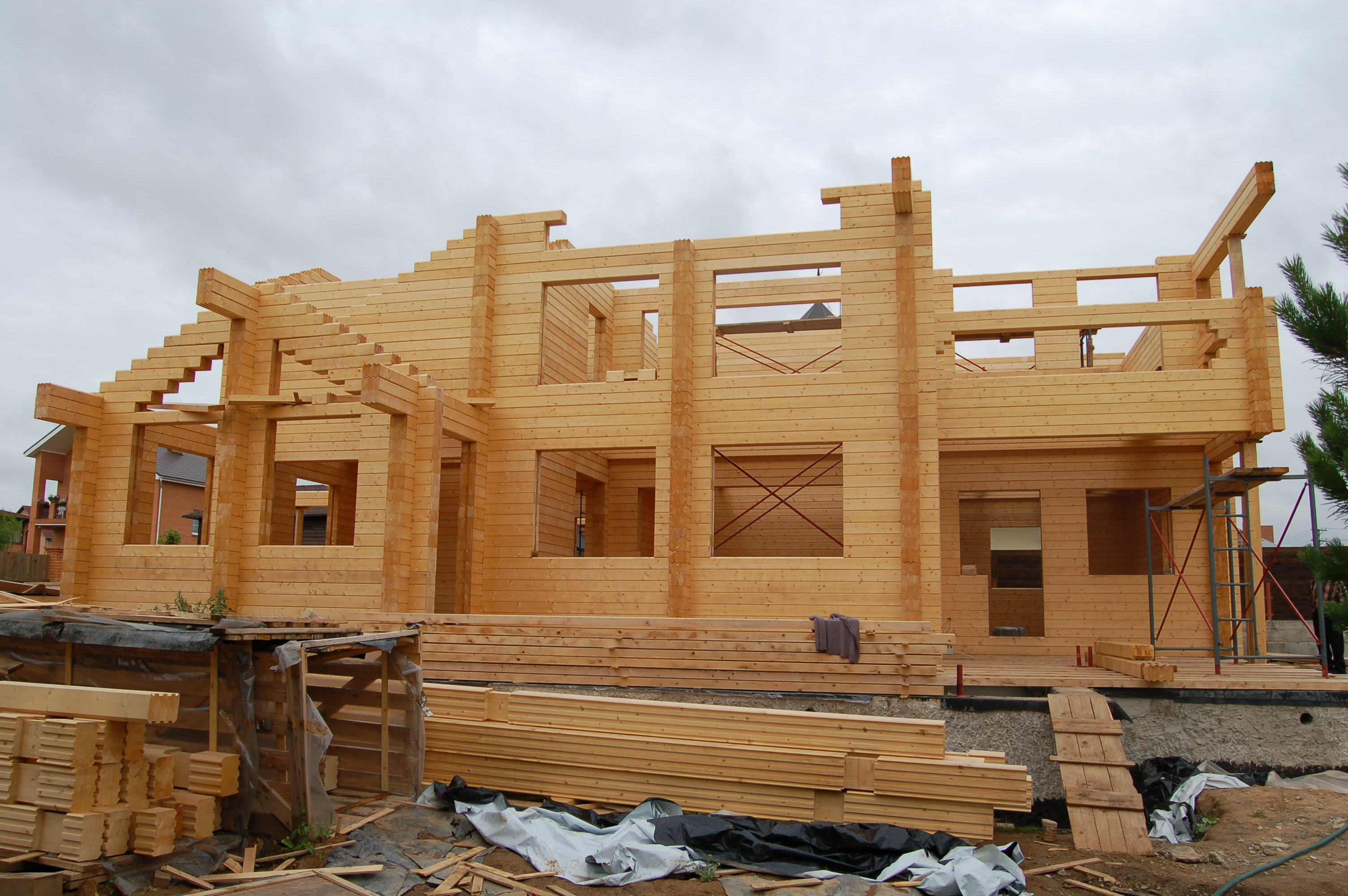 Возведение дома из клееного бруса. НЛК Домостроение, Россия